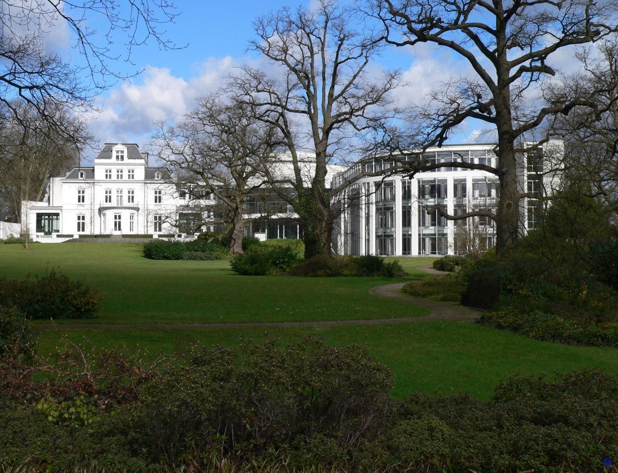 Internationaler Seegerichtshof Hamburg; Elbseite